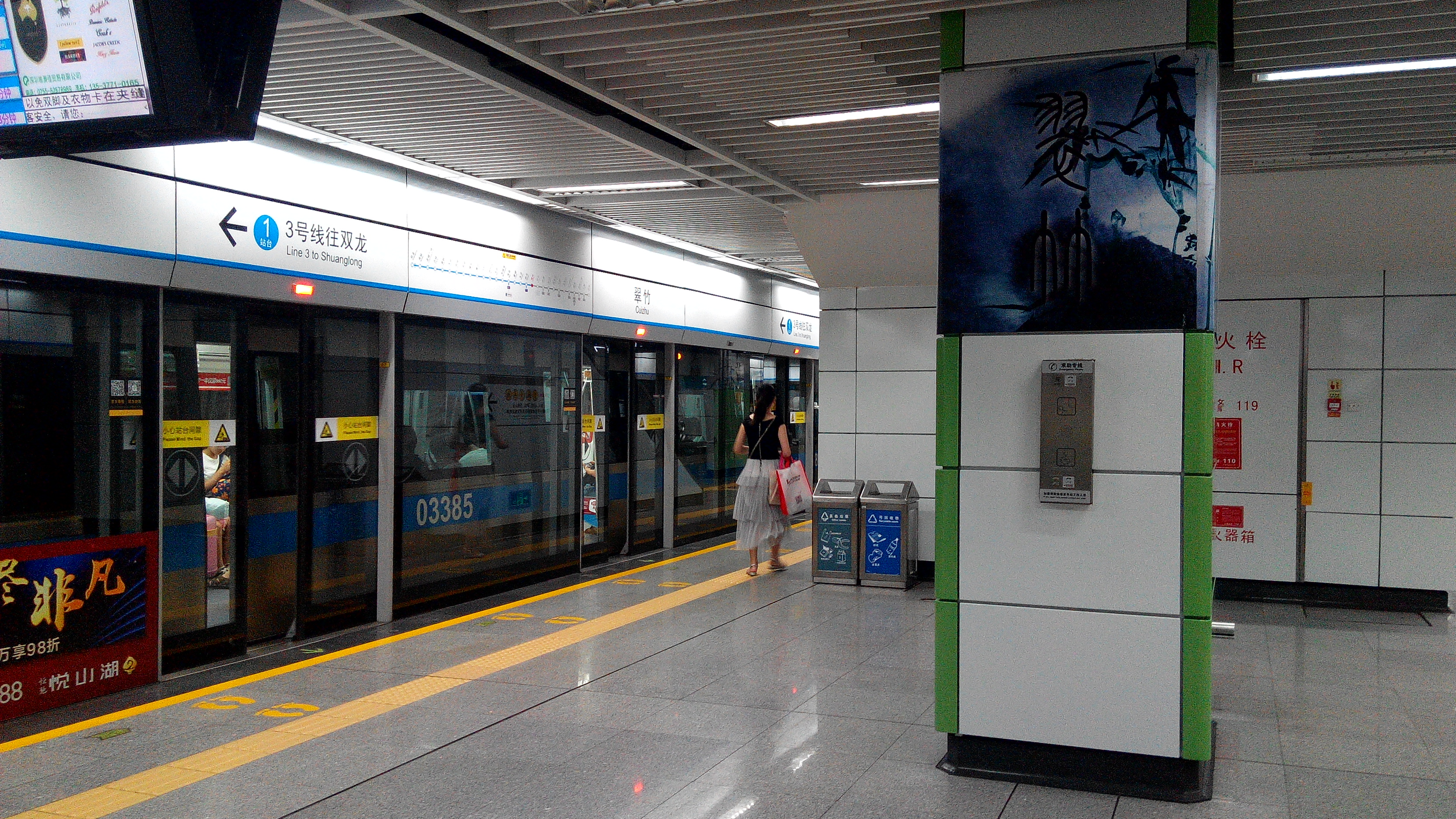 深圳地铁三号线 翠竹站站台